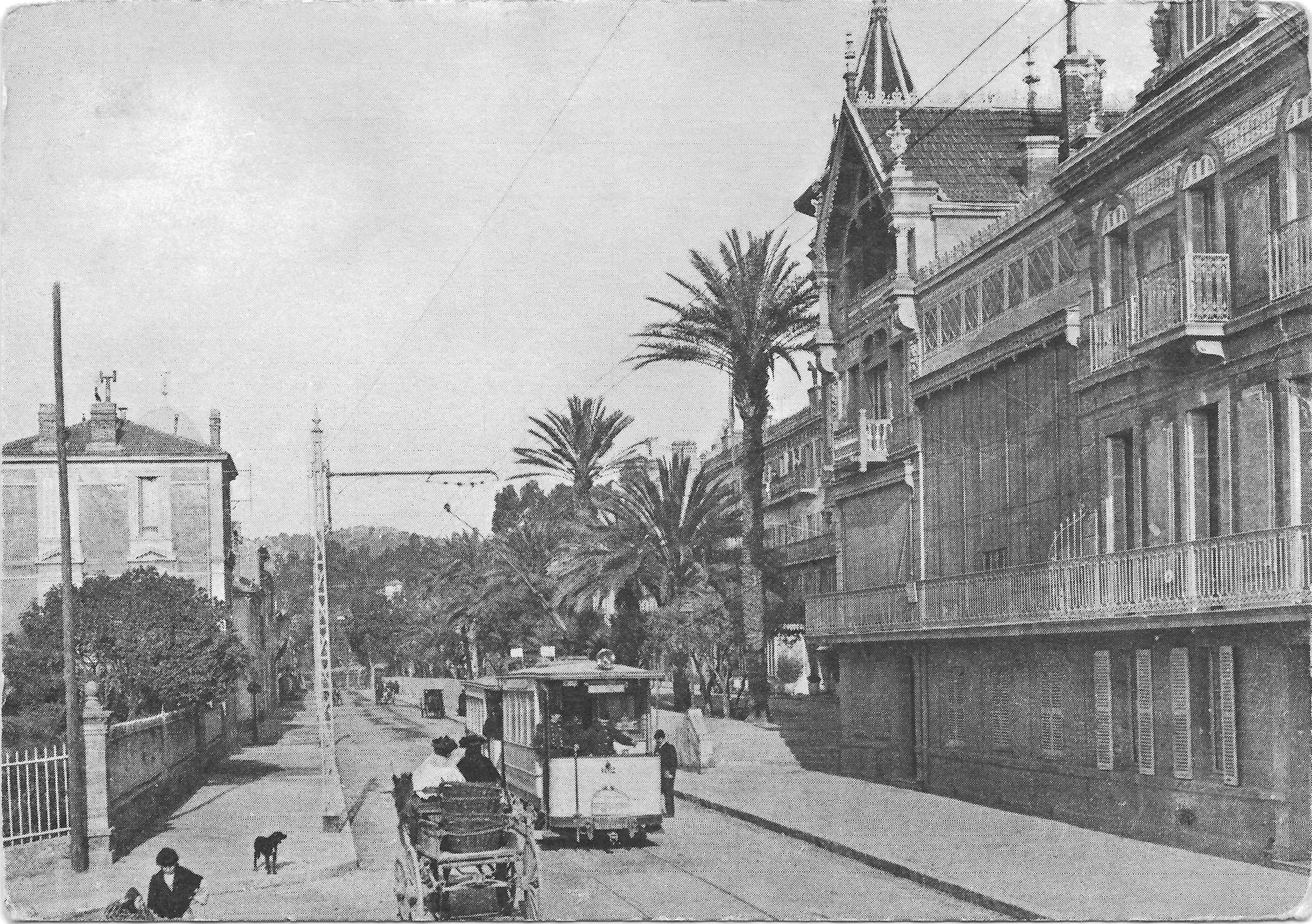 Briefkaart met de tram in Hyères (herdruk van oude foto)